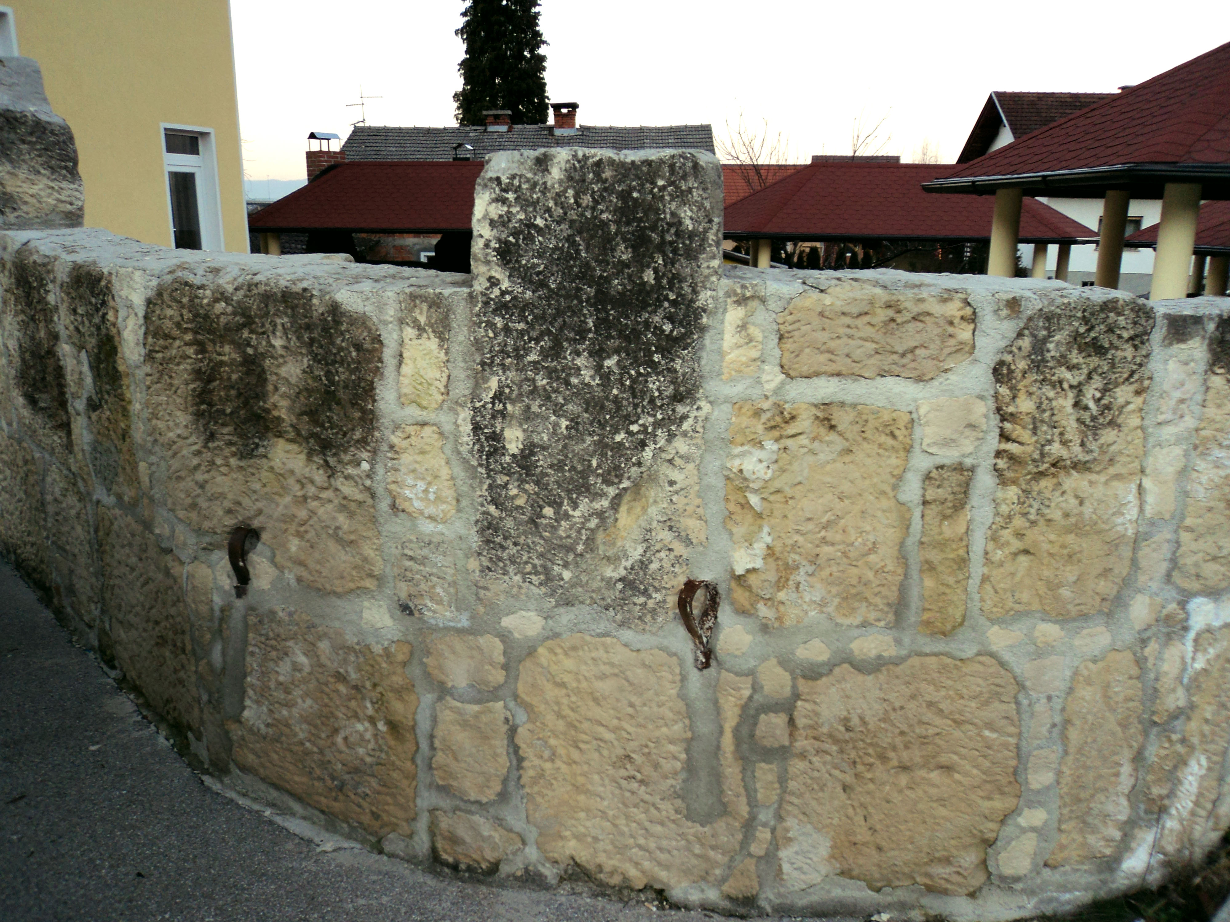 Ostanki dvorca Dvorice v novodobnem objektu Hotel Čateški dvorec 2011